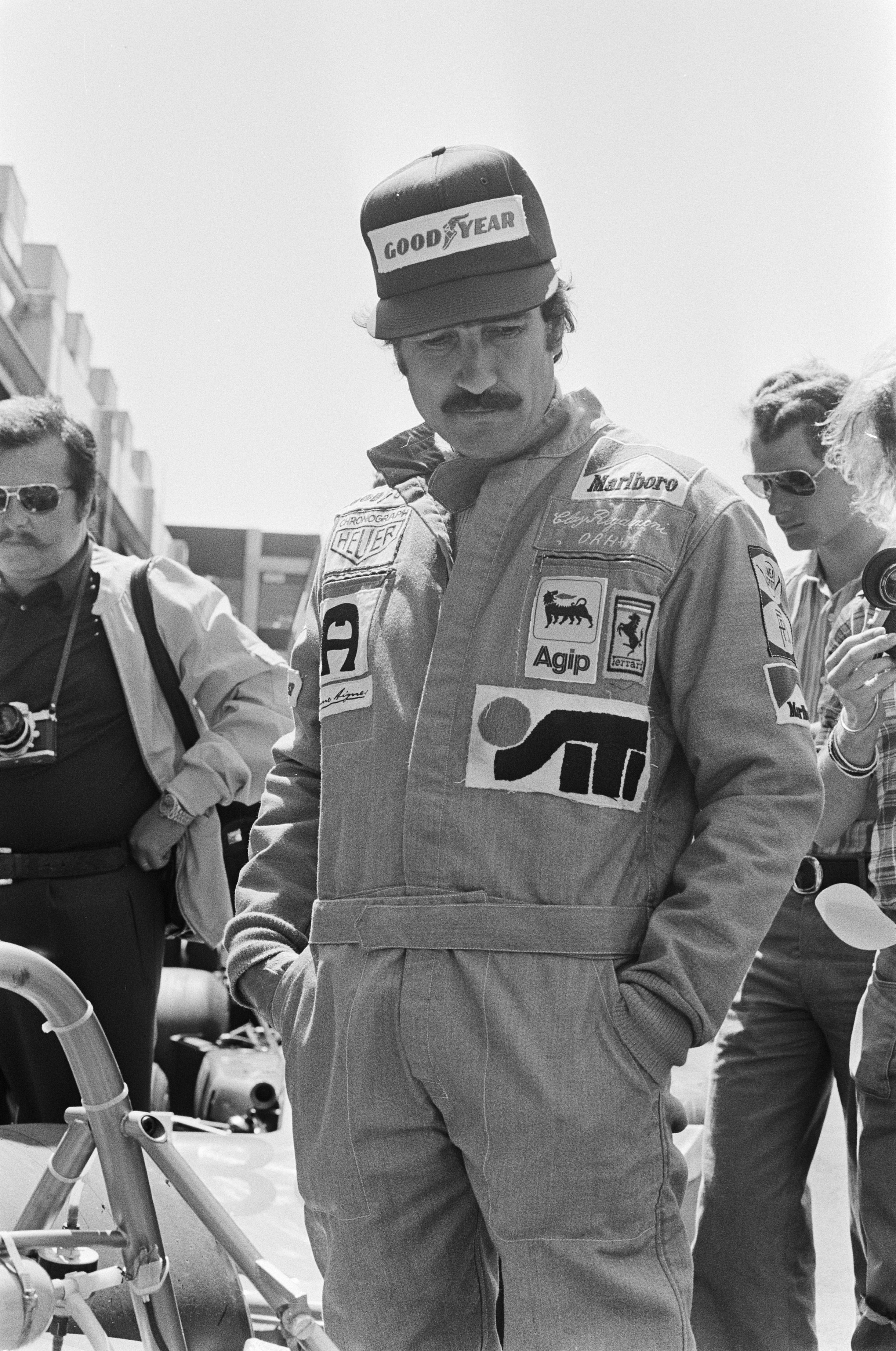 Training Grand Prix op Zandvoort; Clay Regazzoni tijdens training.